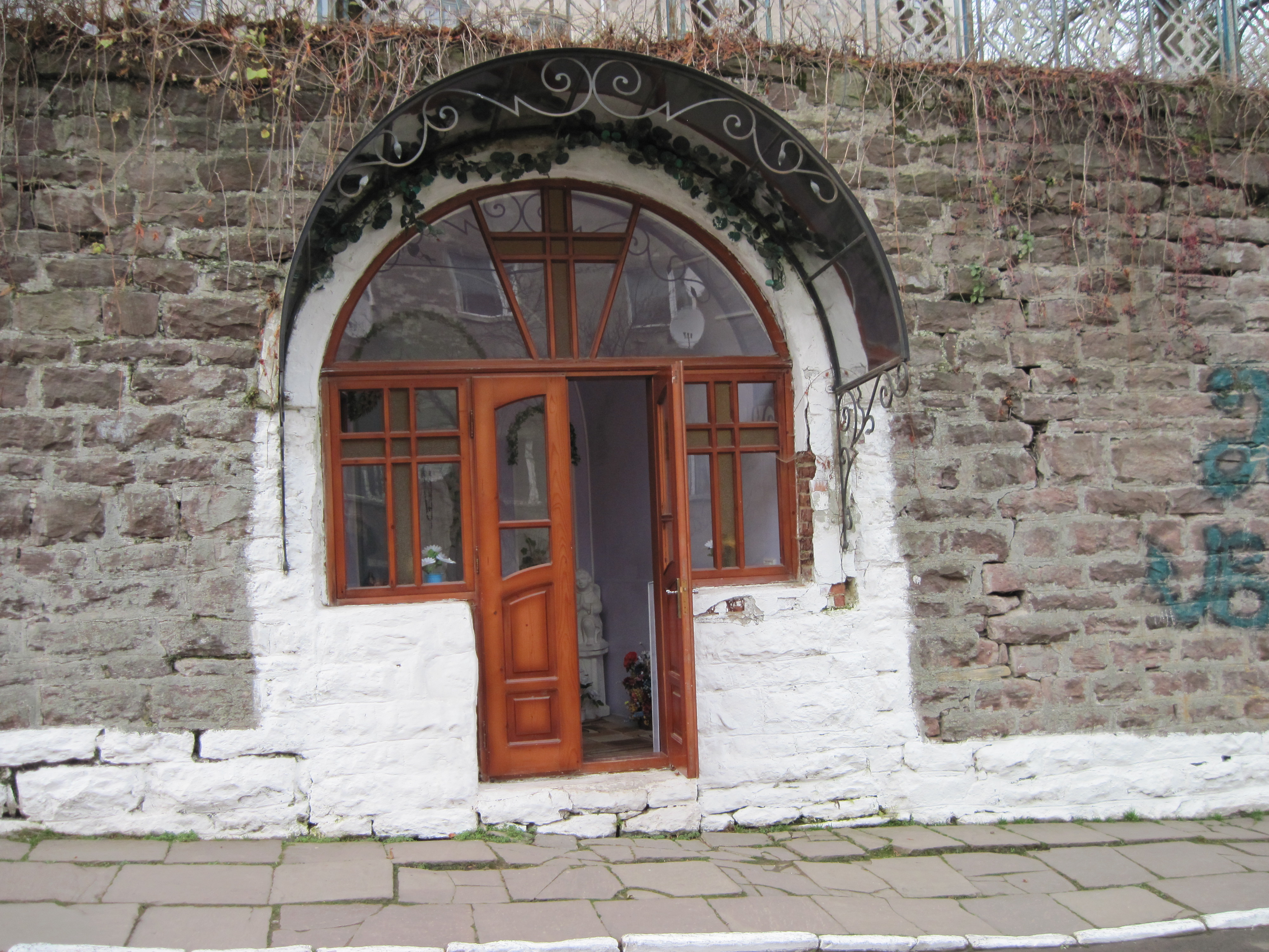 Каплиця в мурі біля ЗОШ № 1. Бучач